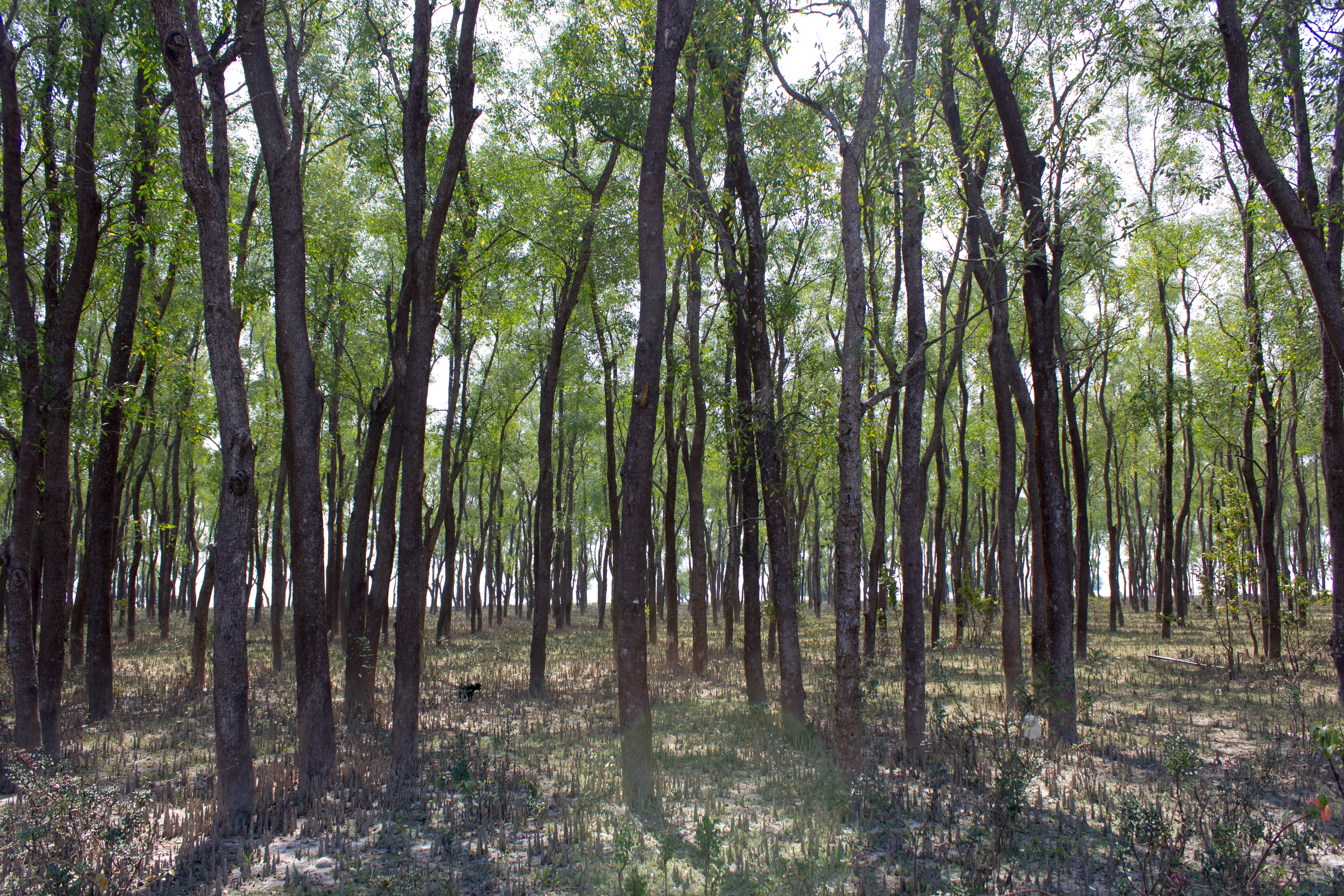 Barguna, Barisal Division, Bangladesh